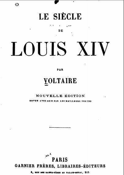 Титульна сторінка твору Вольтера "Доба Людовика XIV" (Париж, 1866)